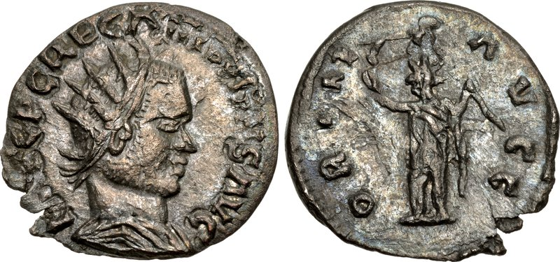 Antoniniano de Regaliano emitido em Carnunto